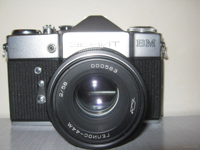 Зенит ВМ